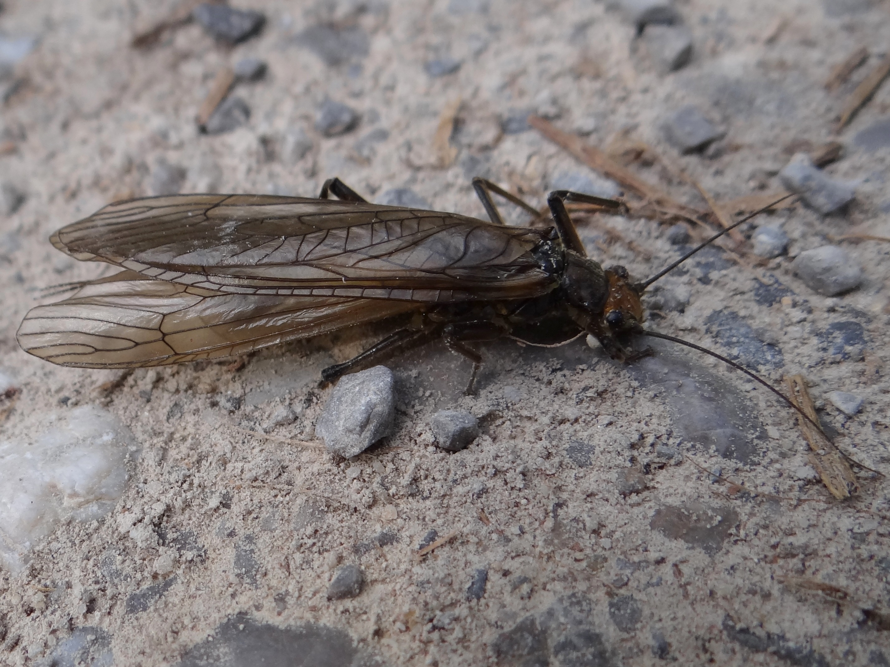 Perla marginata (habitat:Tatra Mountains, Kościeliska Valley)